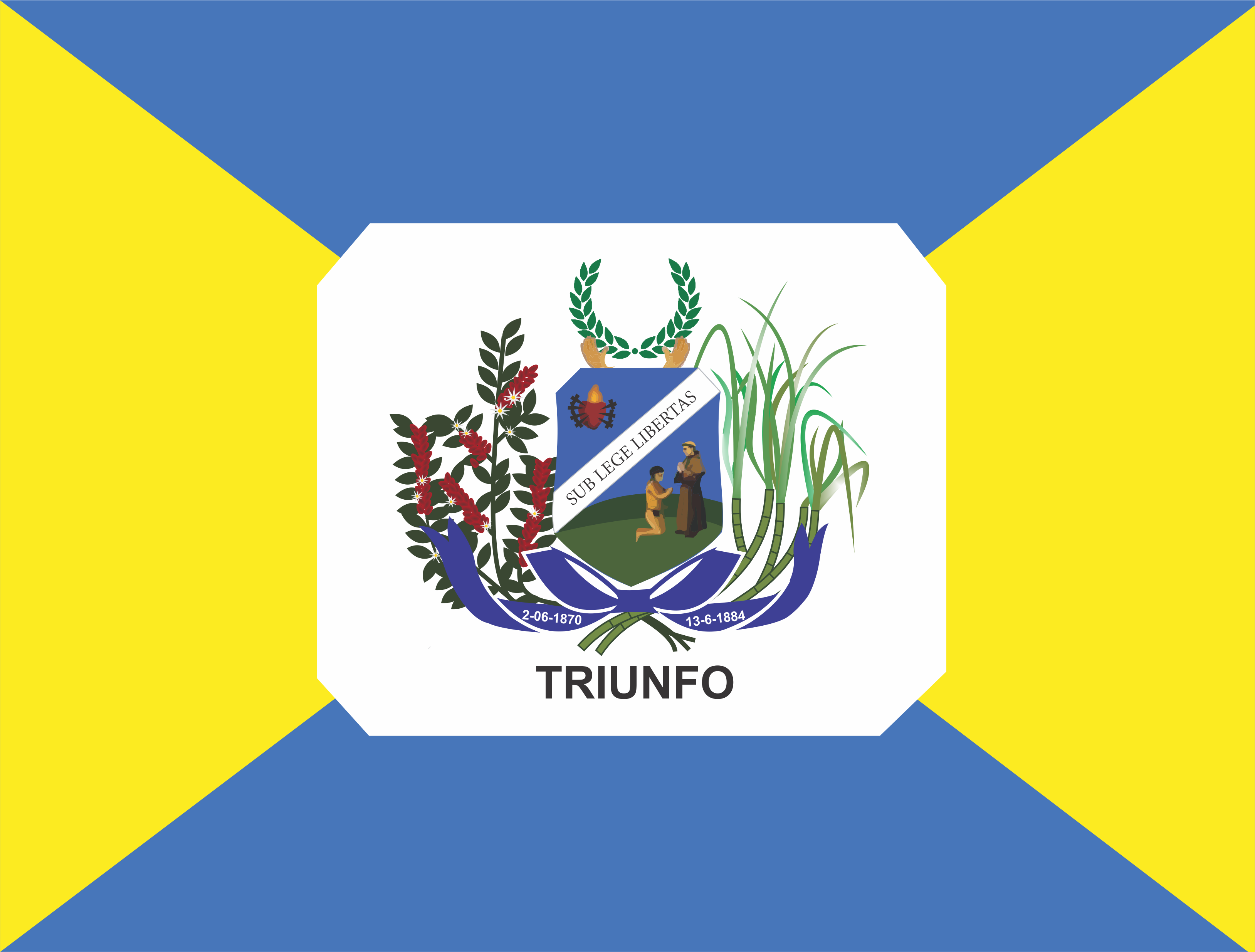 Bandeira do Município de Triunfo, Pernambuco